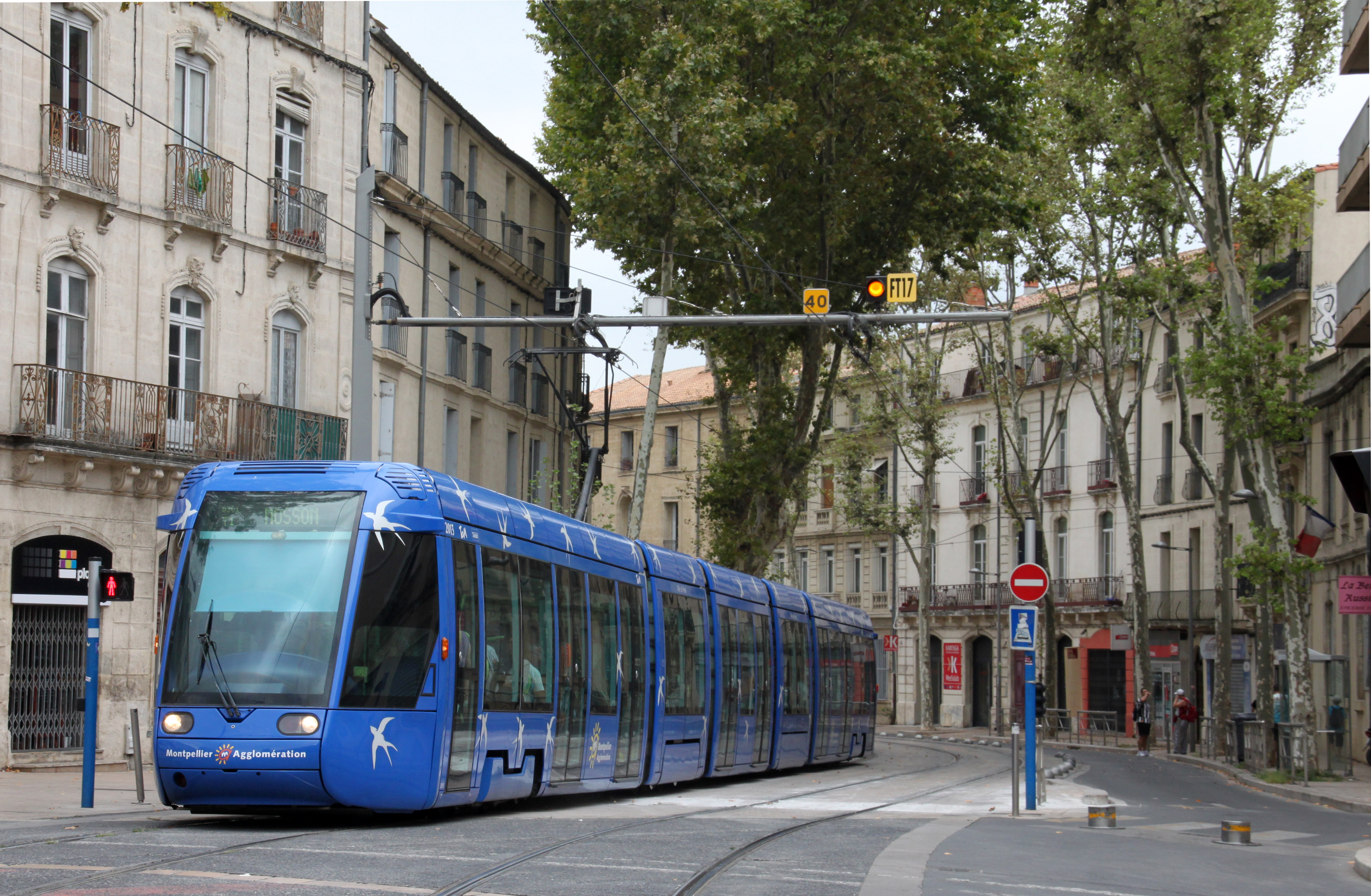 Een Citadis 401 van de tram van Montpellier door de binnenstad van deze Zuid-Franse stad.